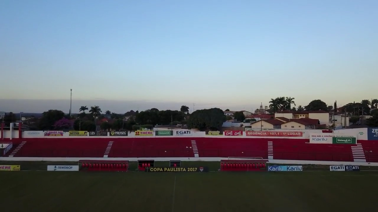 Foto do Estádio Municipal Gilberto Siqueira Lopes